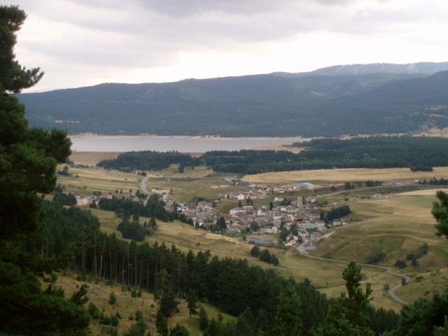 Vue sur Matemale (avec le lac au fond)